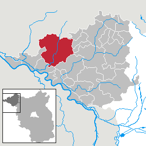 Karstädt in Brandenburg (Country) - District Prignitz